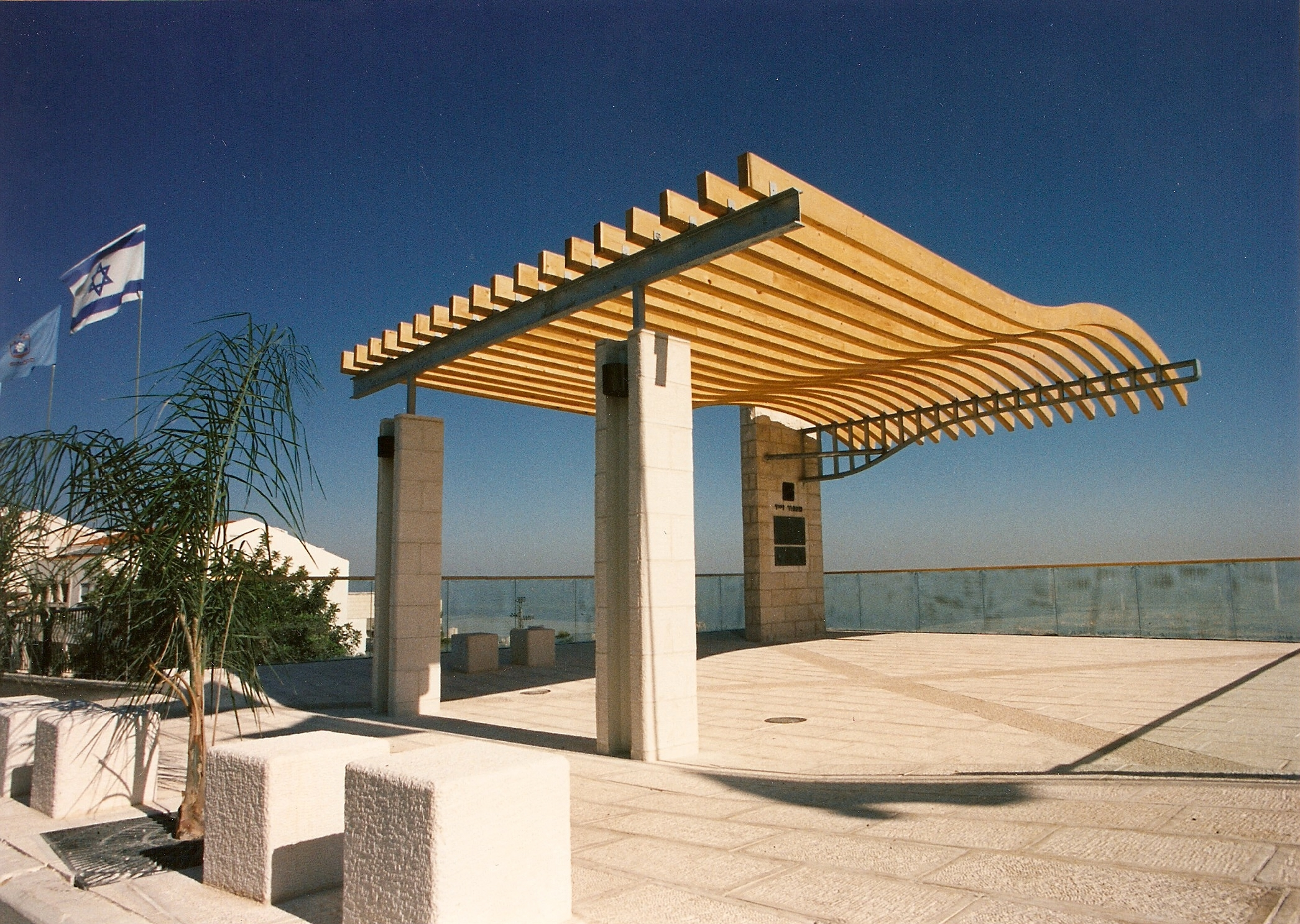 המצפור על שם שאול זייד, בשכונת רמת אלמוגי בחיפה